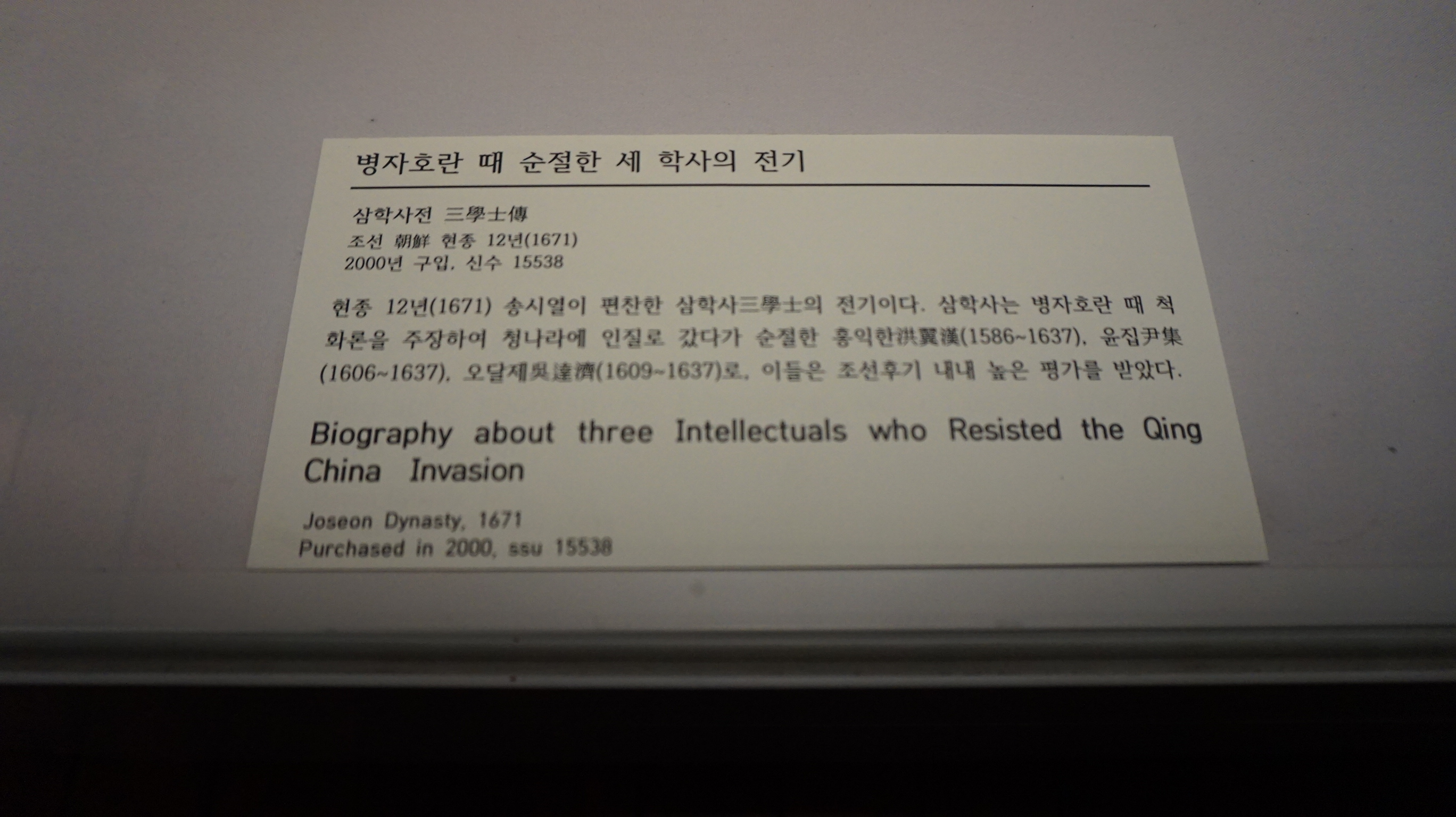 삼학사전 (2)